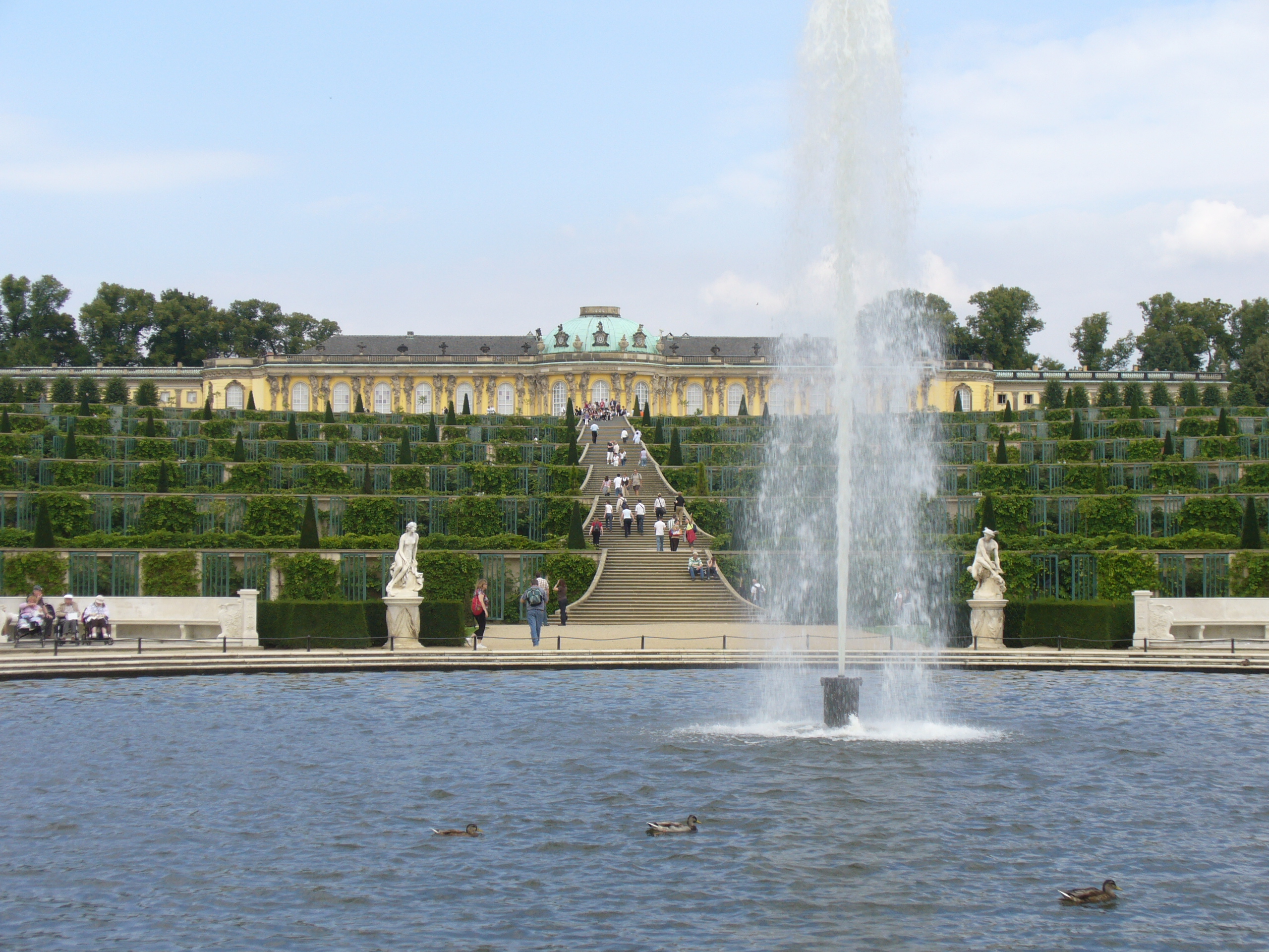 Französisches Rondell Große Fontäne - Sanssouci